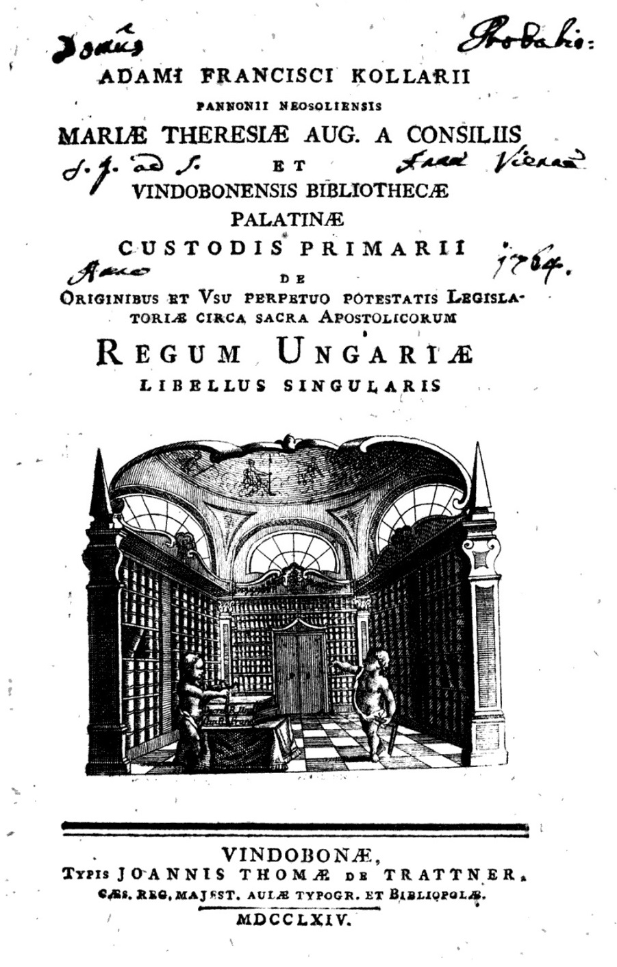 De originibus et usu perpetuo potestatis legislatoriae circa sacra apostolicorum regum Hungariae (Magyarország apostoli királyainak a vallási dolgok körüli törvényhozó hatalmának eredetéről és örökös gyakorlatáról) Kollár Ádám Ferenc 1764-ben Bécsben megjelent munkájának címlapja. A kép saját scan a saját, eredeti példányomról.